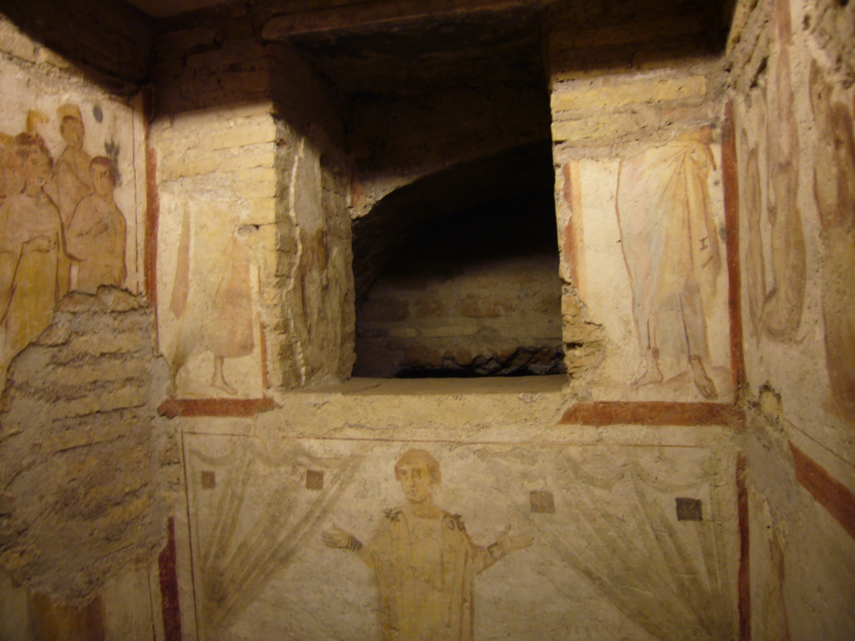 Roma, case romane del Celio - fenestella confessionis della basilica dei santi Giovanni e Paolo